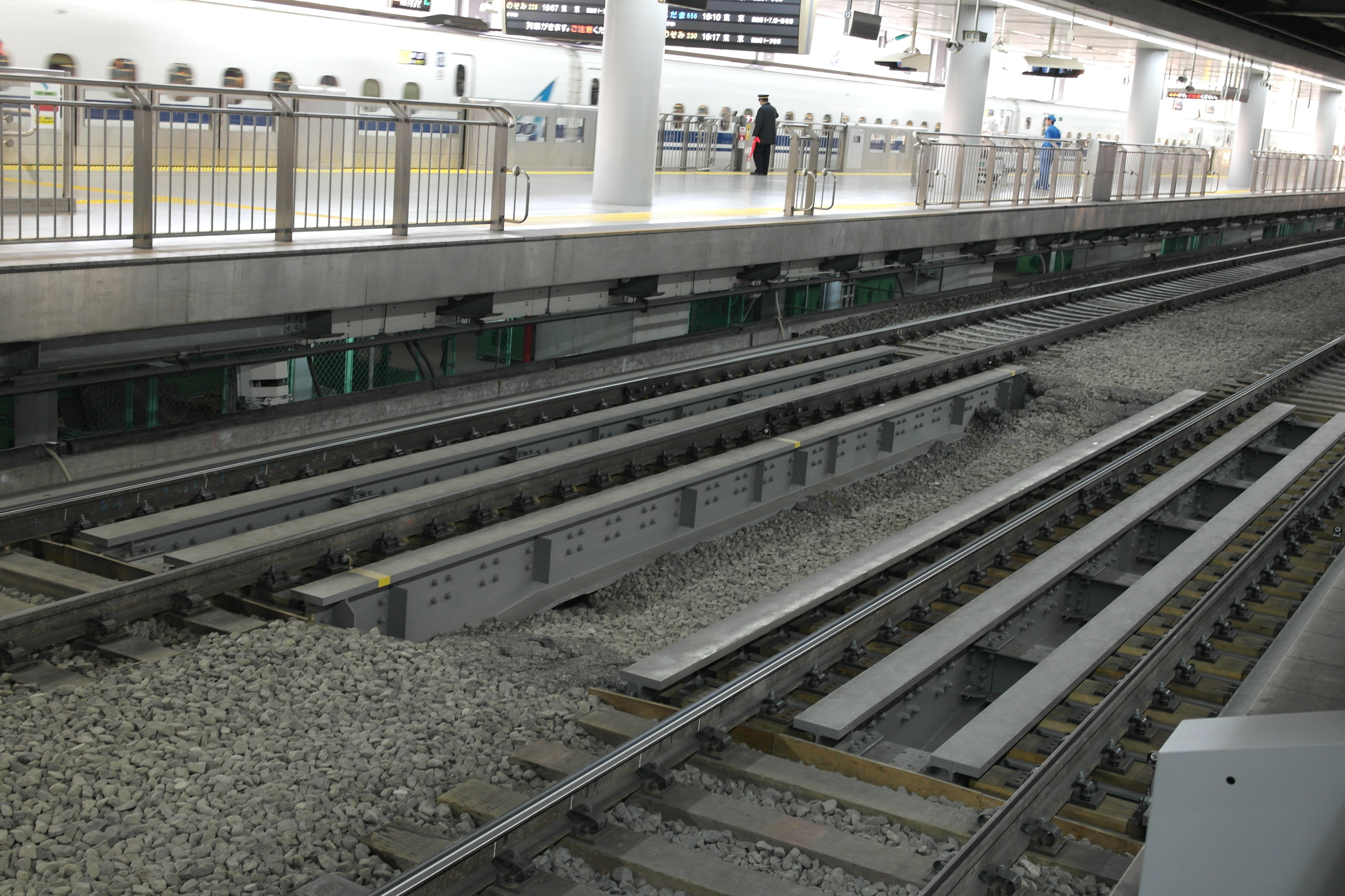 リニア中央新幹線品川新駅工事に伴い東海道新幹線直下を掘削するためバラストを撤去、鋼製橋桁に軌框を設置しスルーガーター（無道床）とした。